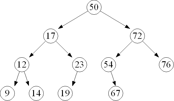 AVL Tree (data structure)